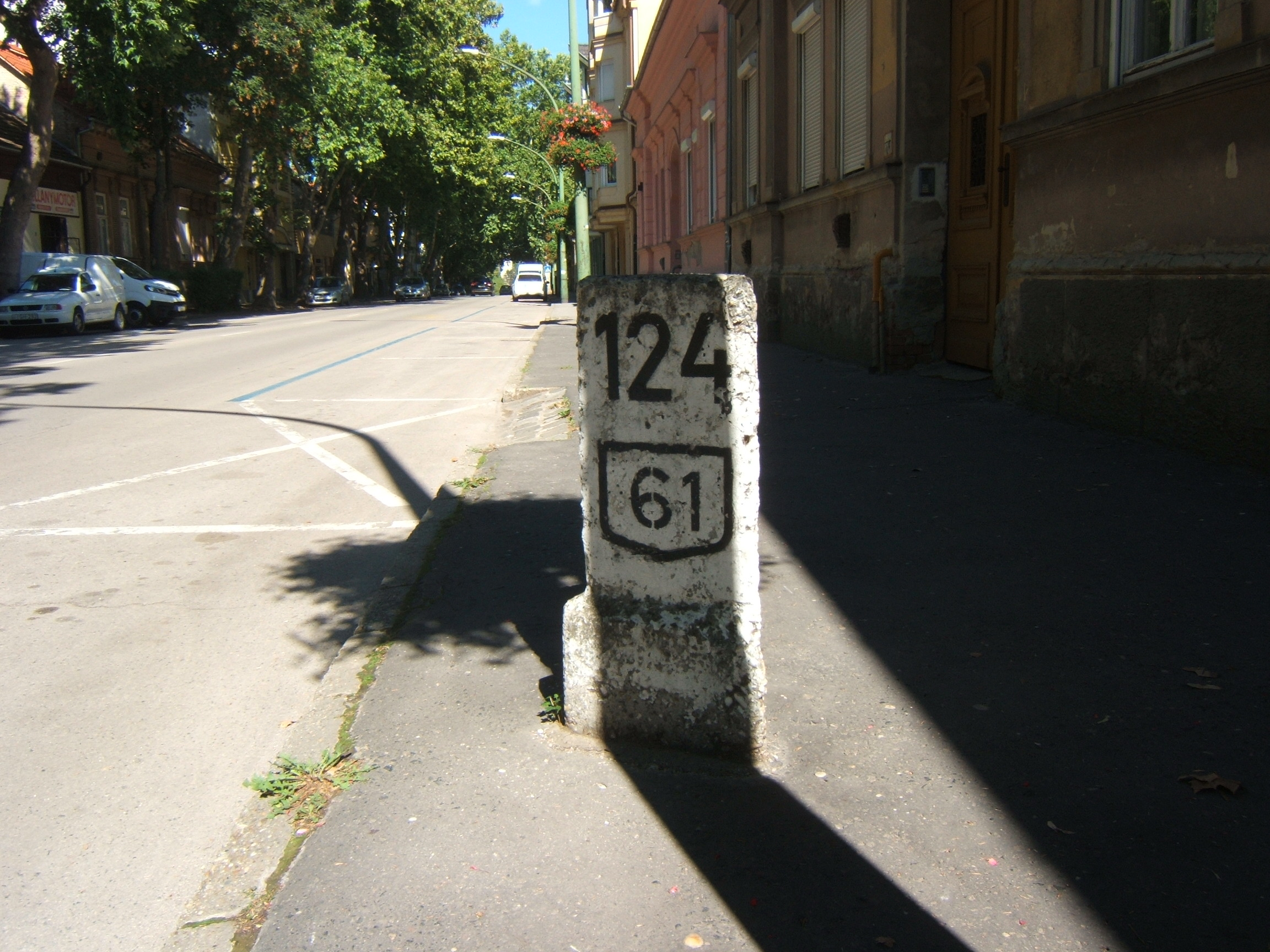 Kaposvár, a régi 124-es kilométerkő